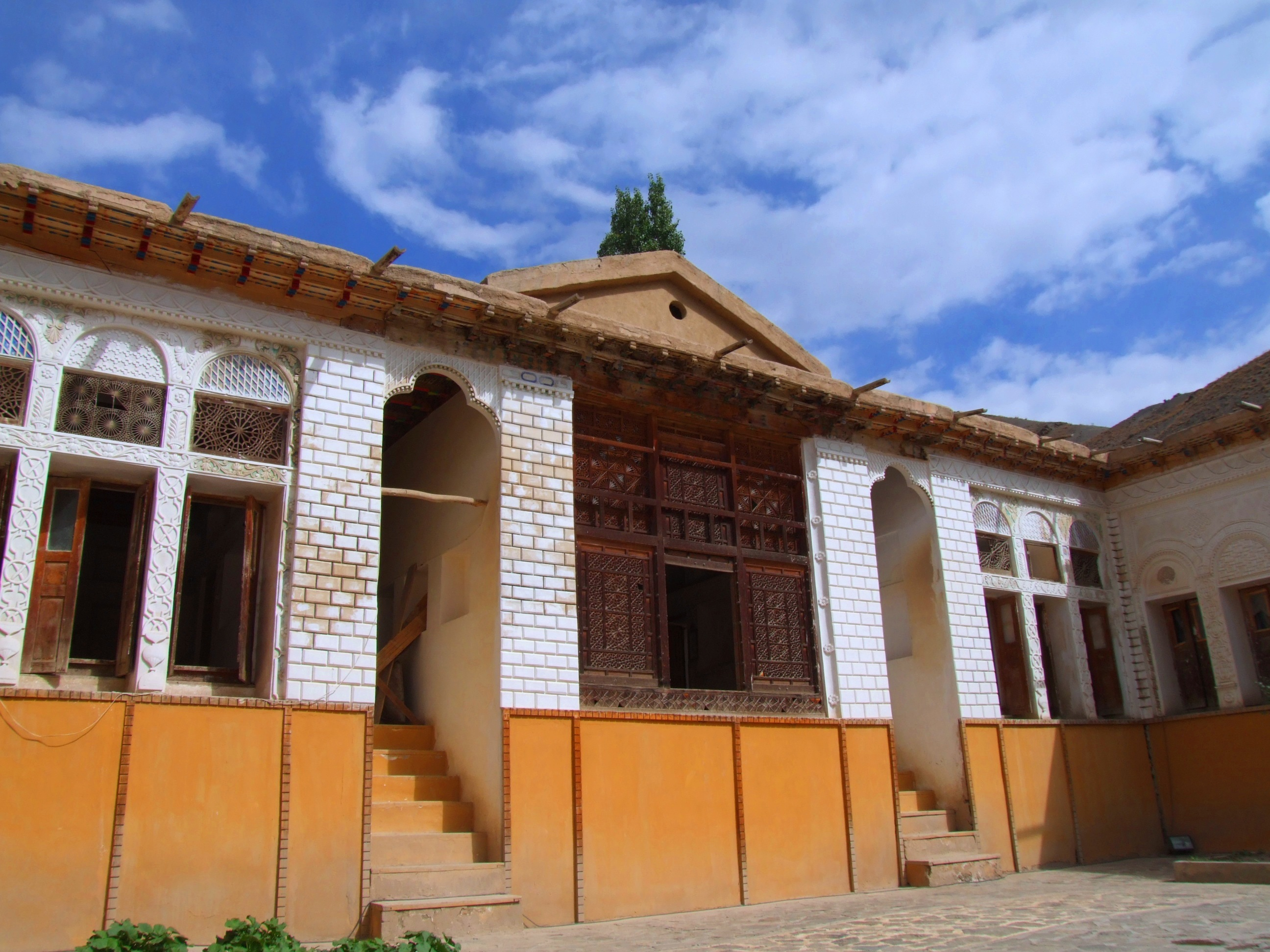 منزل نیما یوشیج در یوش